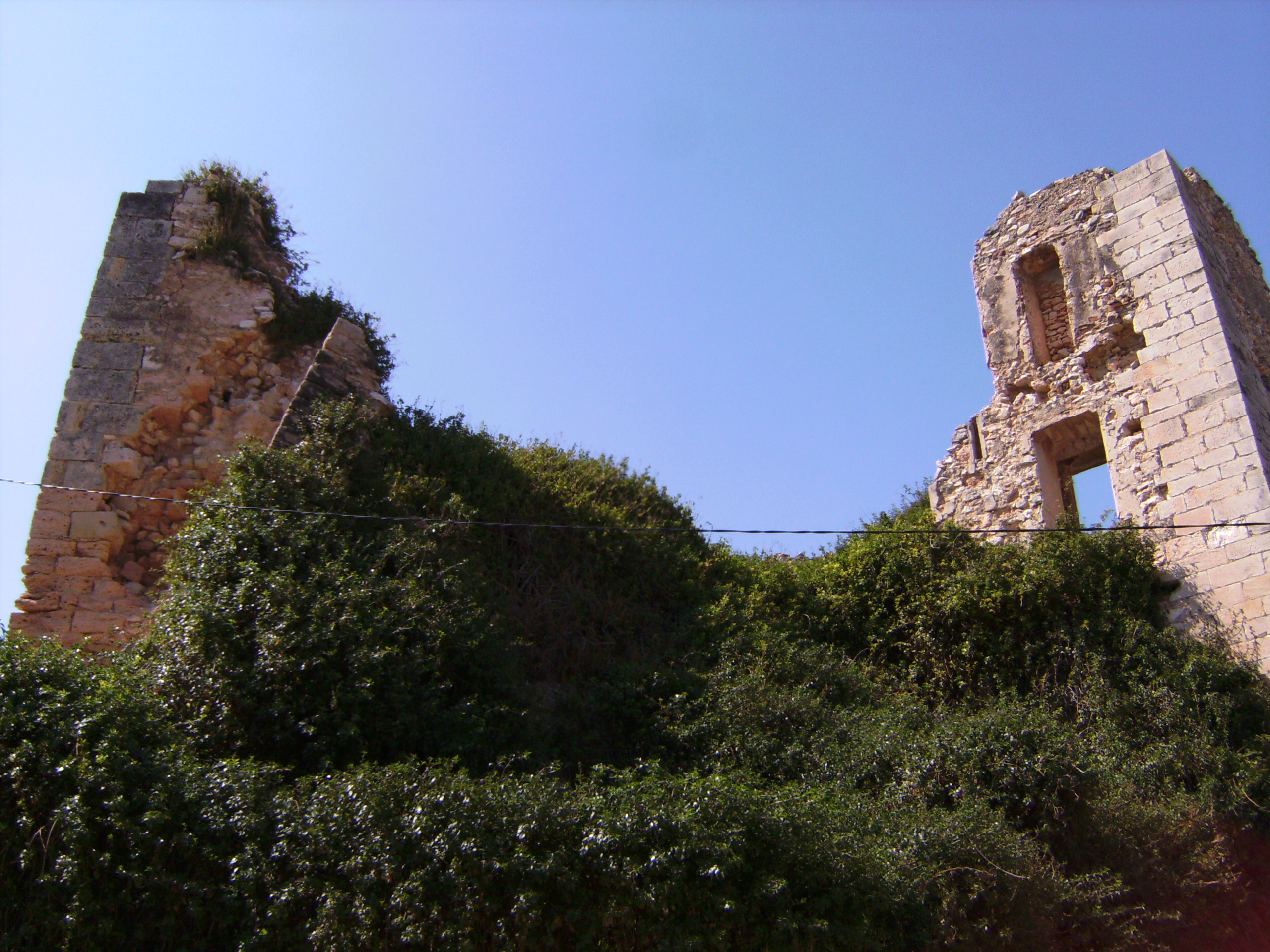 Els Garidells - Castillo (Vista Exterior 2)